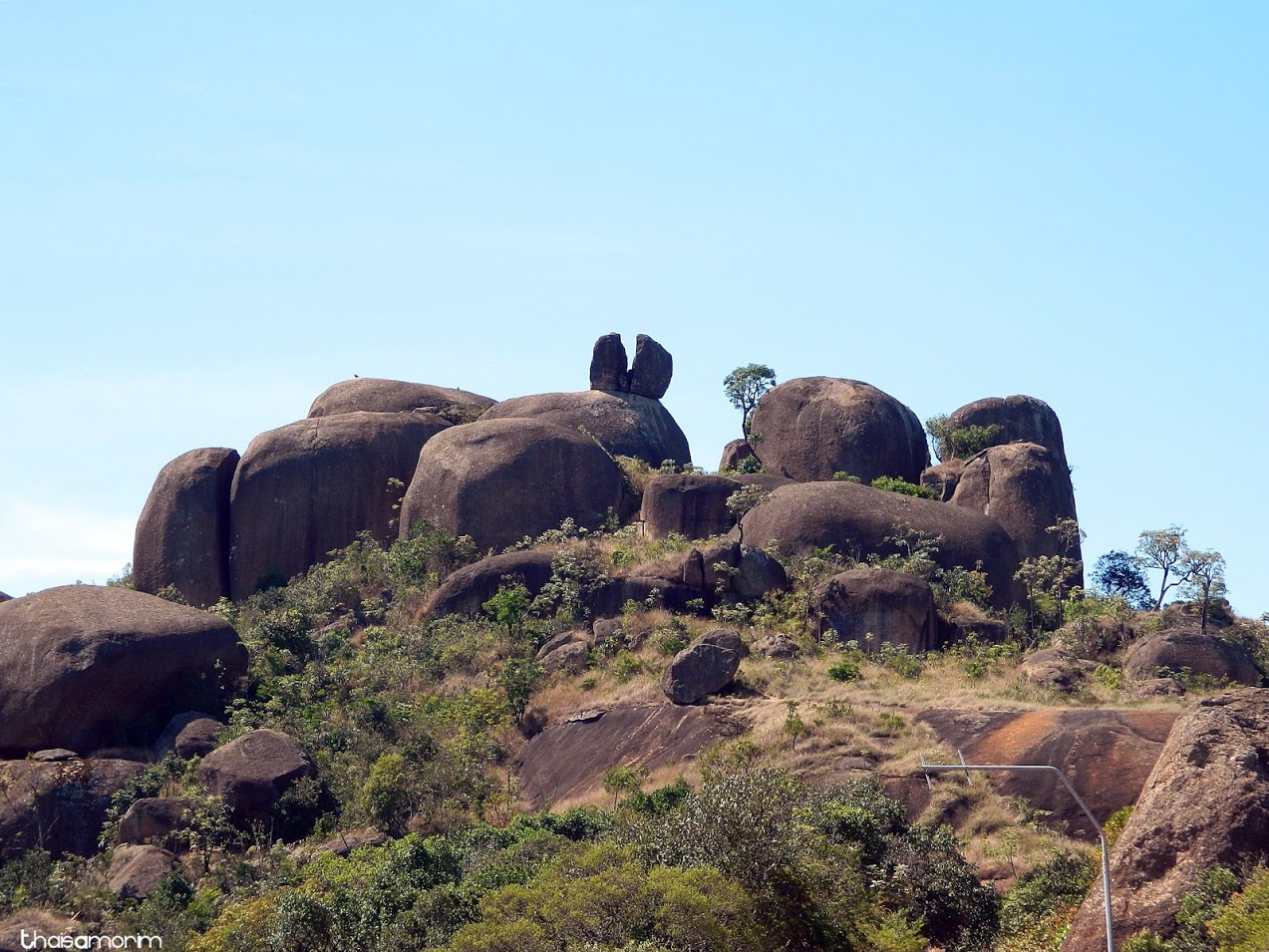 Pedra Grande - Atibaia